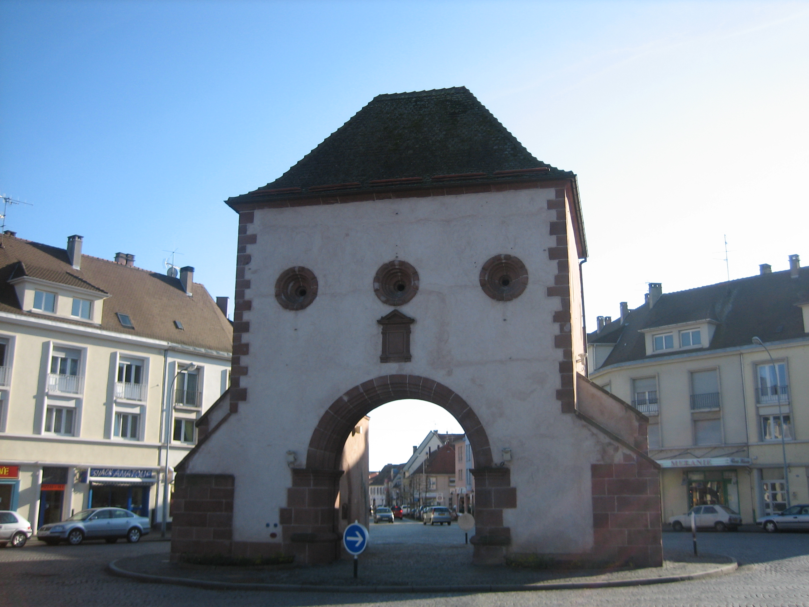 Porte de Wissembourg à Haguenau (Bas-Rhin, France)